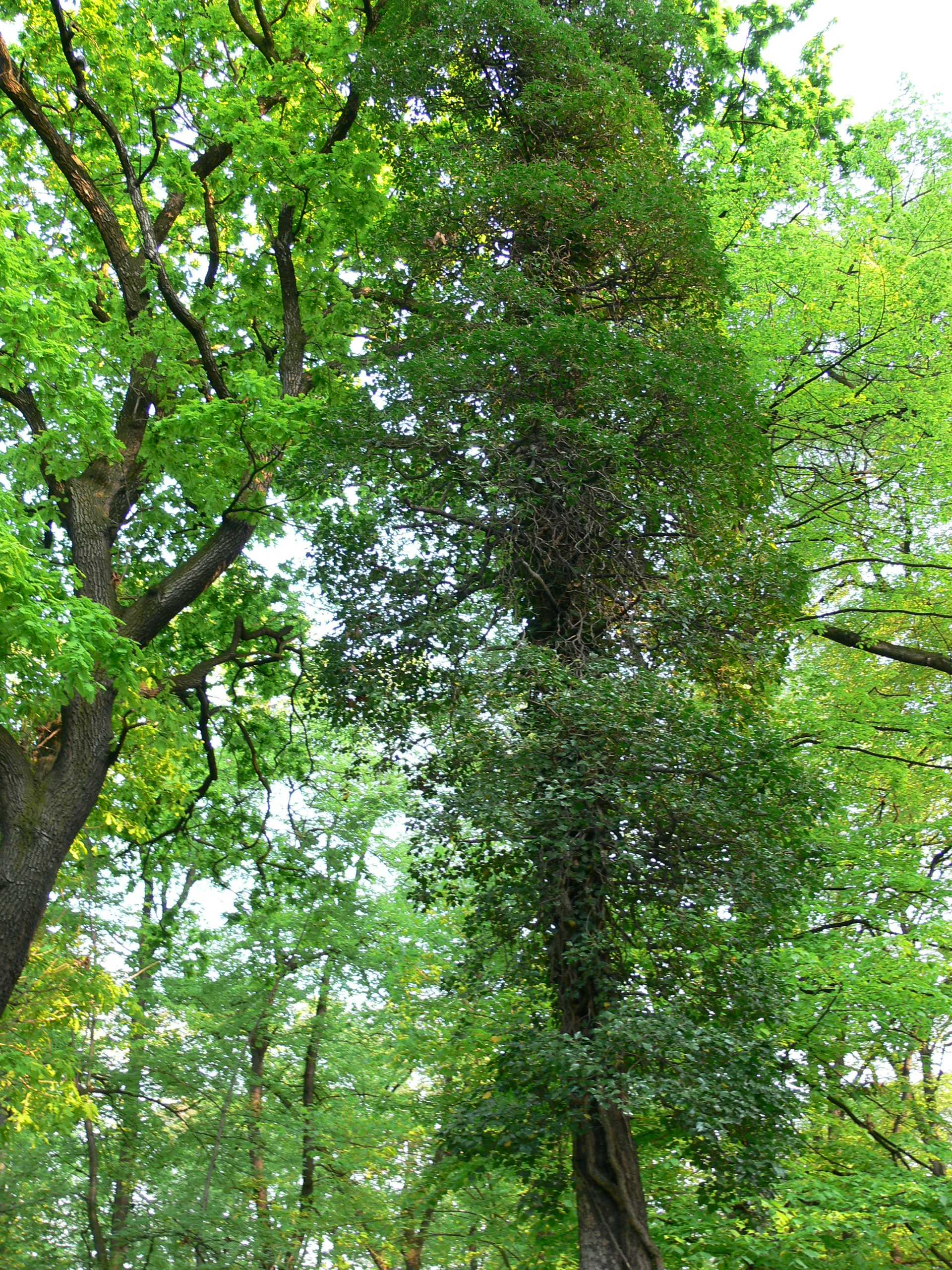 Racibórz — Park im. Miasta Roth: bluszcz pospolity